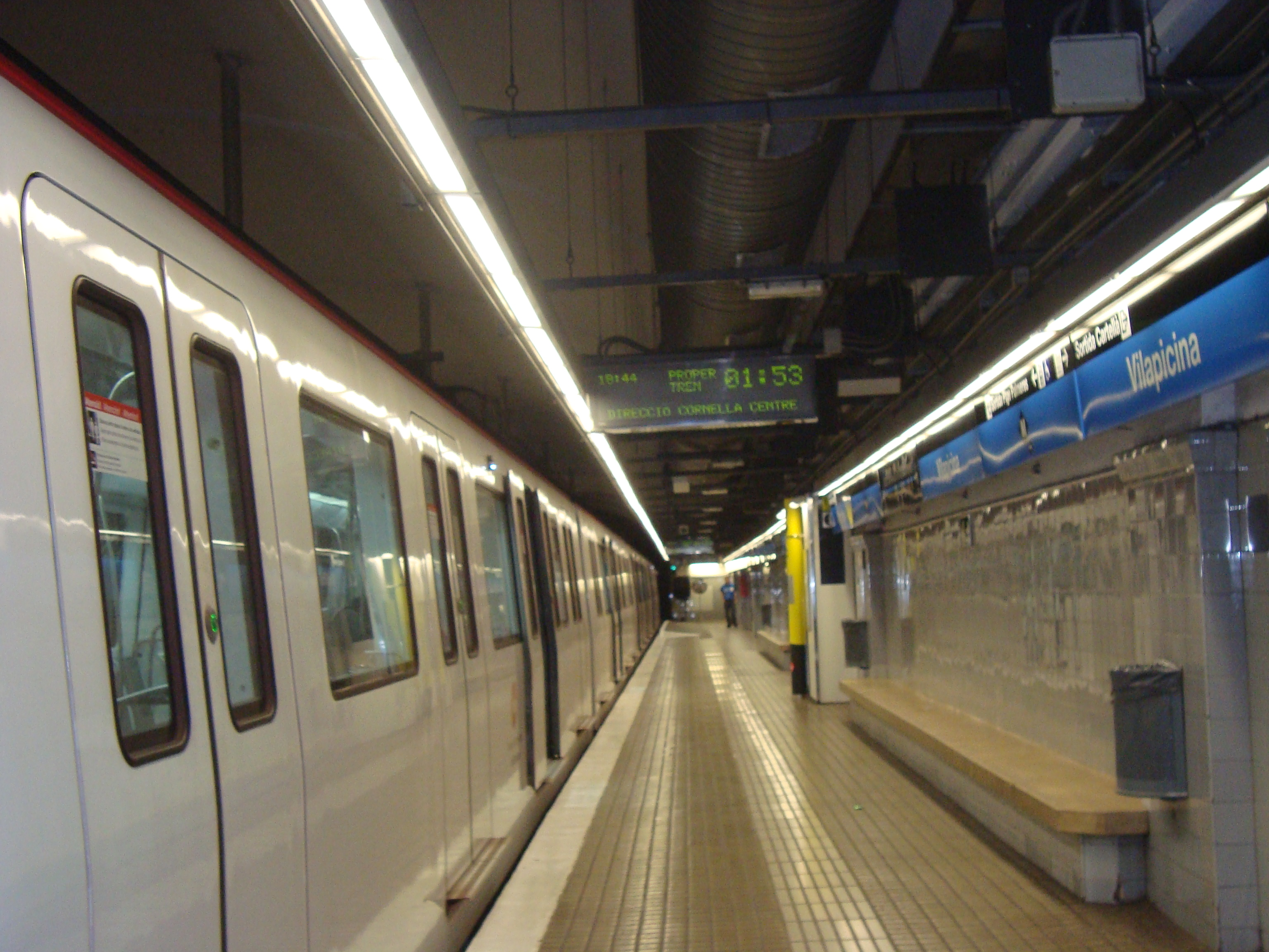 Estació de Vilapicina del metro de Barcelona.